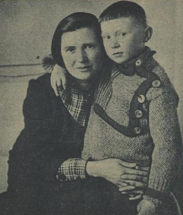 Helena Salichová (1895-1975), česká etnografka, malířka, ilustrátorka